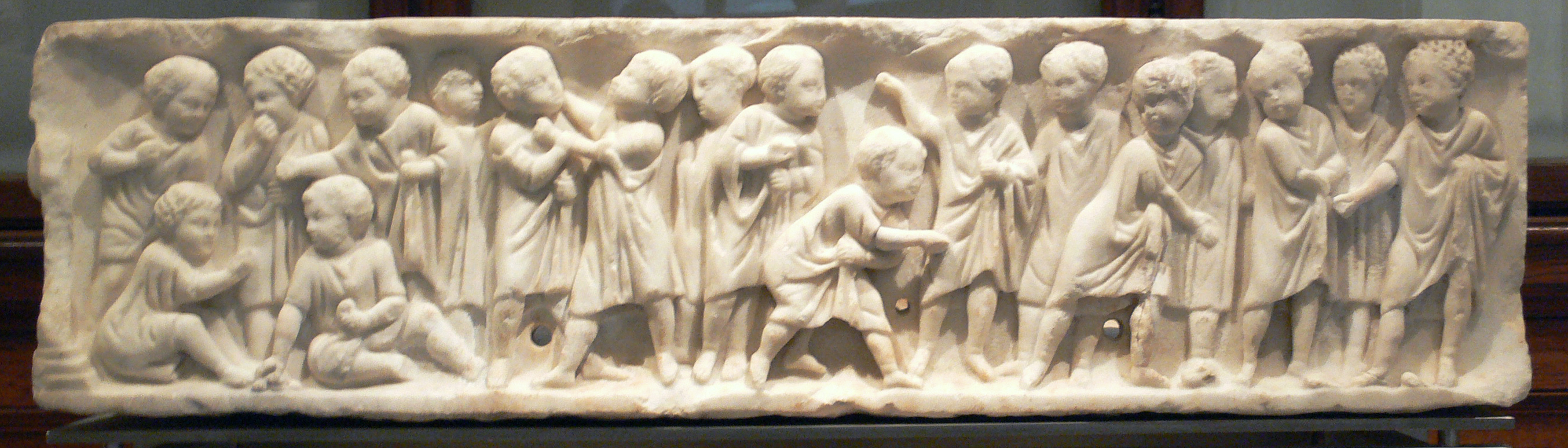 Wien, Kunsthistorisches Museum, Antikensammlung, Kindersarkophag, römisch, 170–180 n. Chr., Inv. Nr. I 1129